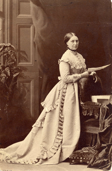 Marie-Louise-Flore Masse (Madame Pierre-Joseph-Olivier Chauveau)